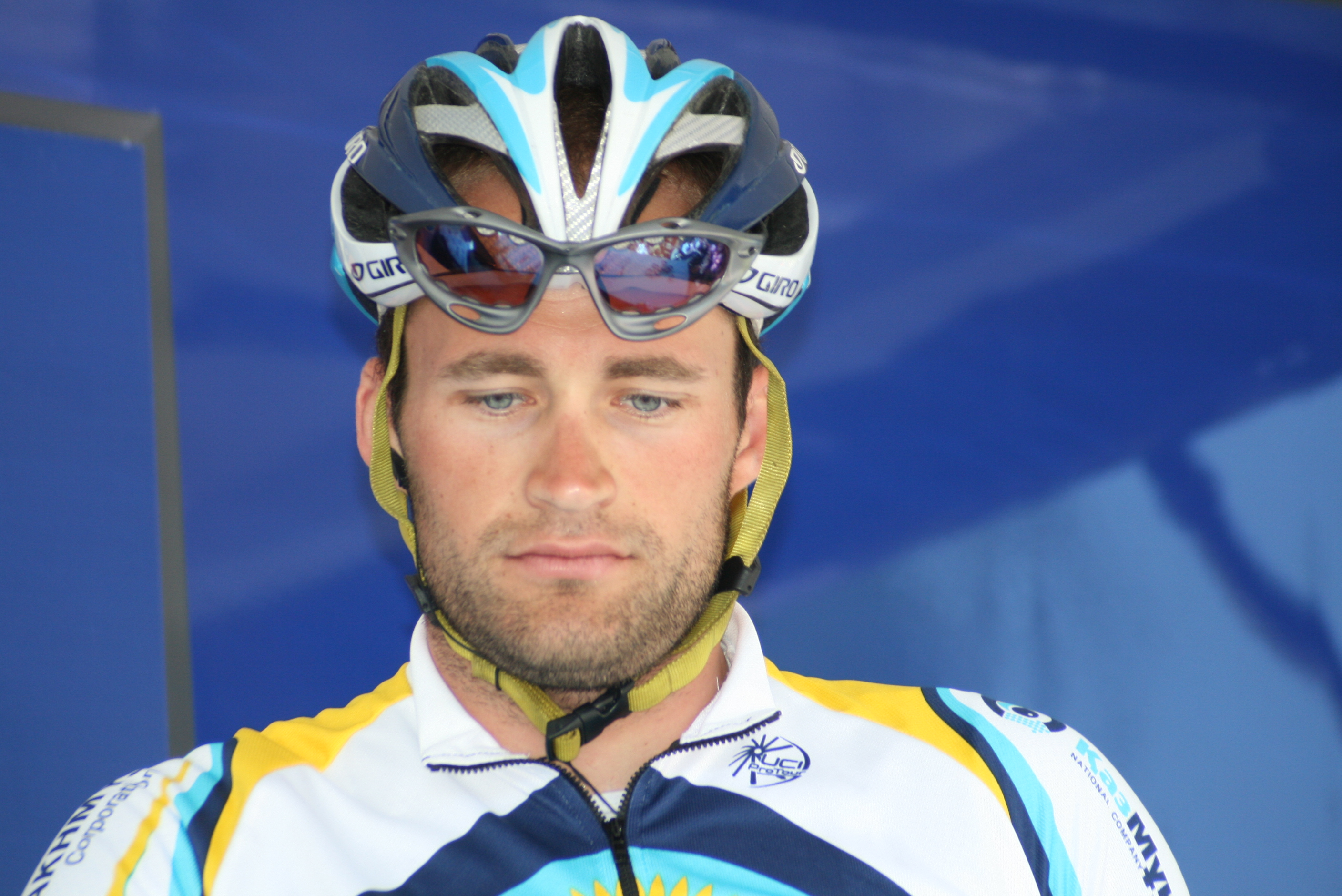 Tomas Vaitkus aux Quatre jours de Dunkerque 2008